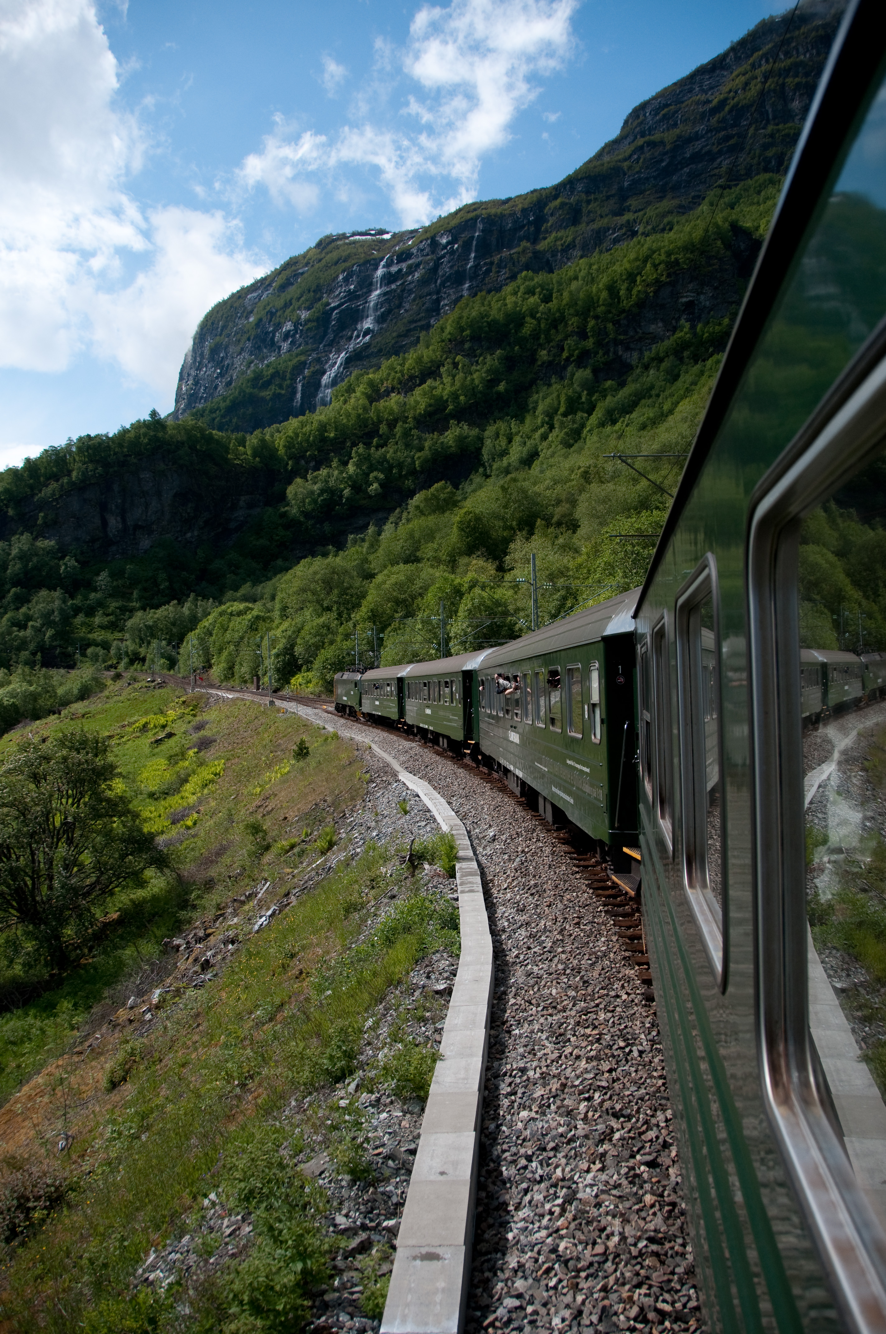 Flåmsbana